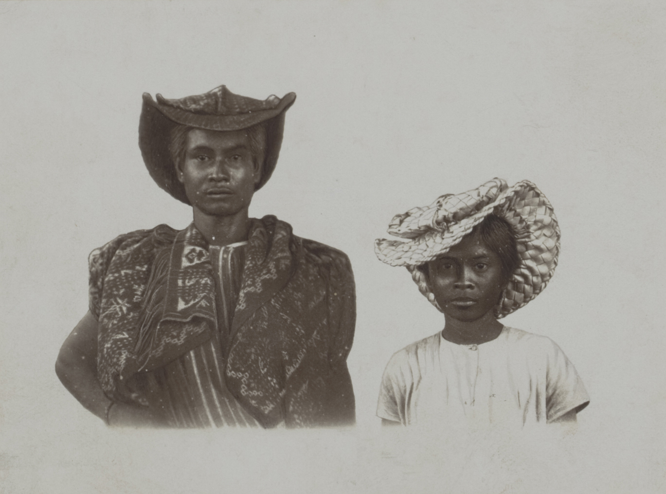 Academische Collecties: 1899-1900, Siboga-expeditie naar Nederlands Oost-Indië, onder leiding van Max Wilhelm Carl Weber De twee Rotinezen dragen sierlijk gevlochten hoeden van stro, karakteristiek voor het eiland.